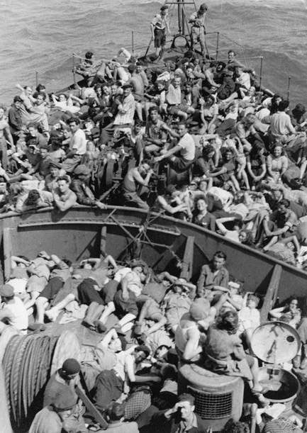 חלק קטן ממעפילי הגנה מתרווח על סיפוני האונייה